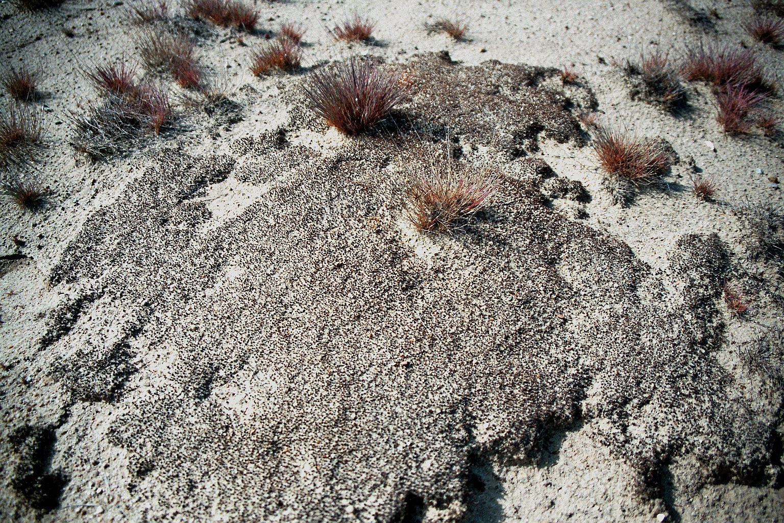 Glashaar-Widertonmoos (Polytrichum piliferum) und Silbergras (Corynephorus canescens) gehören zu den ersten Pflanzen, denen es gelingt, auf den unwirtlichen Offensandflächen der Lieberoser Wüste Fuß zu fassen. Die Lieberoser Wüste befindet sich inmitten der Lieberoser Heide in der Nähe von Lieberose, Landkreis Dahme-Spreewald, Brandenburg, Deutschland. Die rund 5 Quadratkilometer große Panzerwüste ist die größte Wüste Deutschlands. Sie ist durch die militärische Nutzung auf dem ehemaligen sowjetischen (russischen) Truppenübungsplatz Lieberose entstanden. Seit 1999 ist die Wüste Teil des Naturschutzgebietes Lieberoser Endmoräne. (Hinweis: Das Foto entstand während einer fachlich geleiteten Führung.)